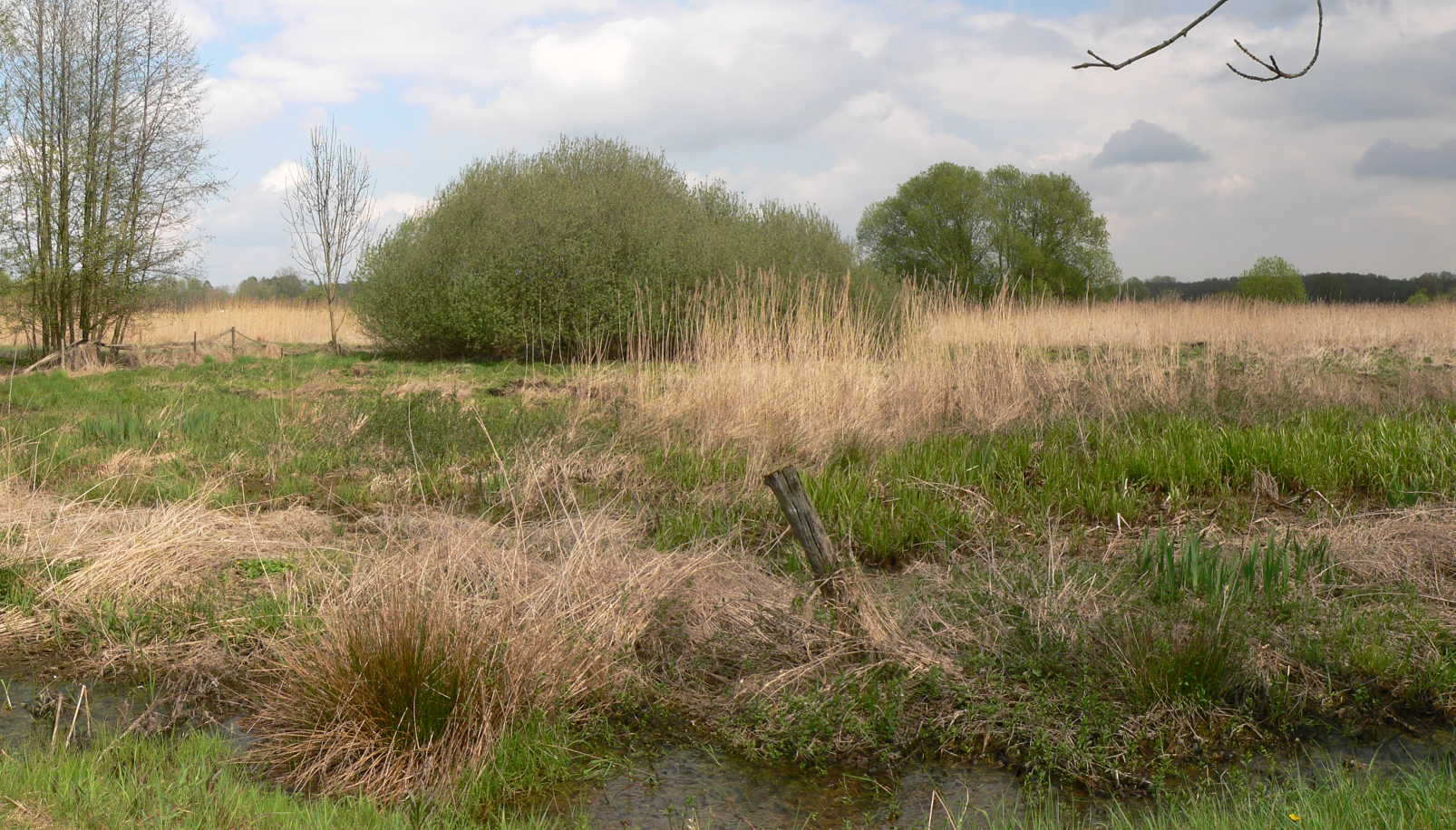 Blick auf das Gelände mit dem Standort der Wasserburg Vöhrum